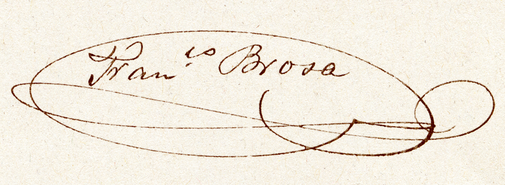 Firma de Francico Brosa